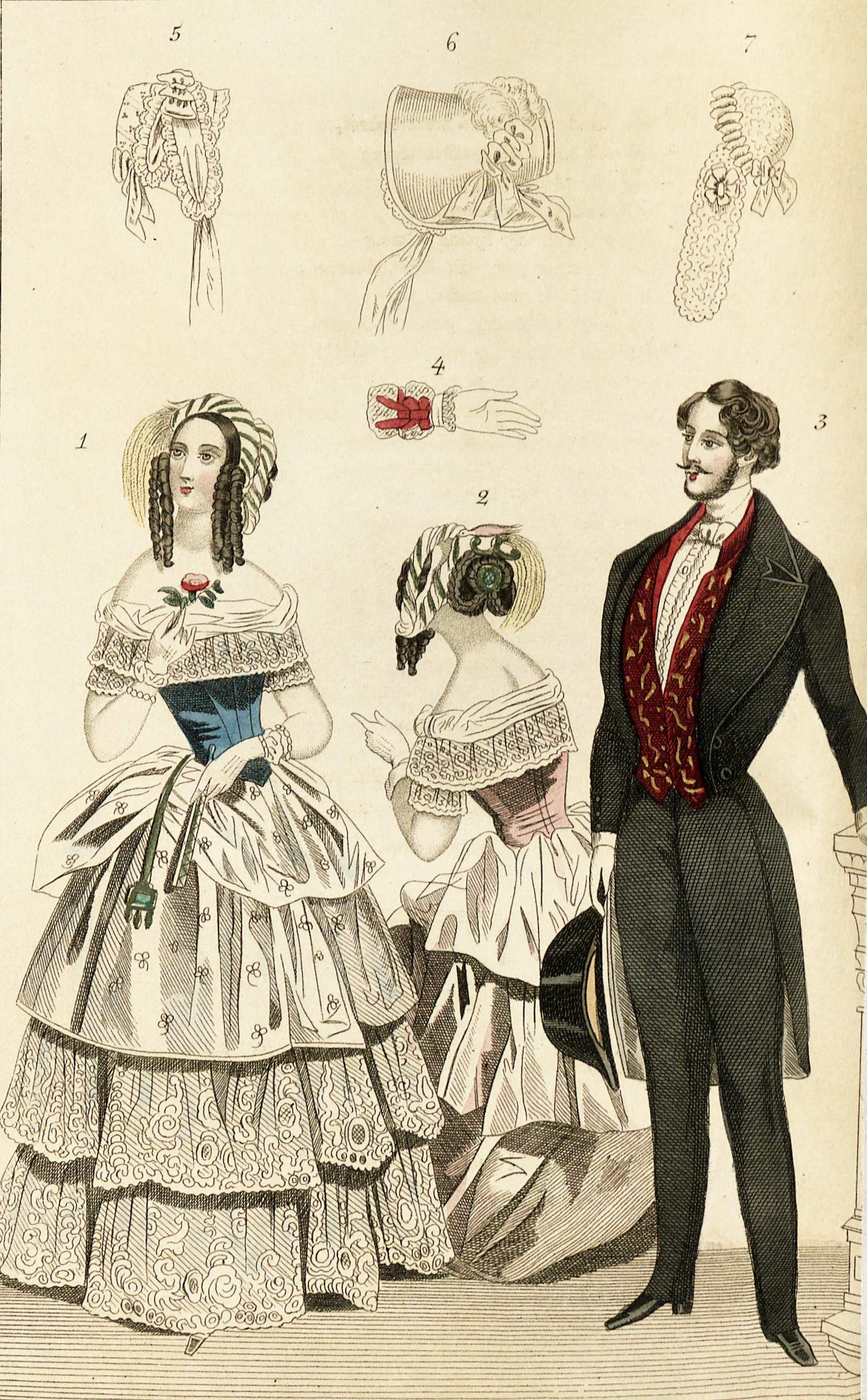 Huvudbonad; Fjädrar; Klänning; Frack; Halsduk; Väst; Pantalonger; Mössa; Band; Hatt; Plymer